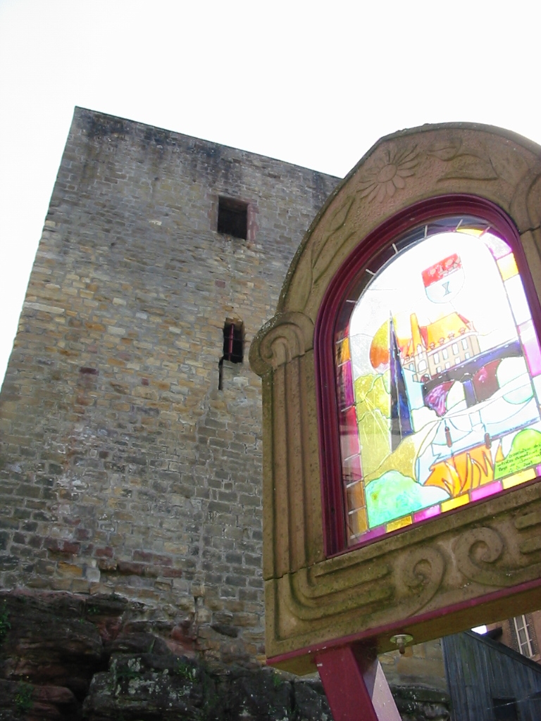 Tour des Voués Construite vers 1305 (territoire de Deneuvre à l'époque) Baccarat (Meurthe-et-Moselle) Photographie personnelle, prise le 4 mai 2006 Copyright © Christian Amet